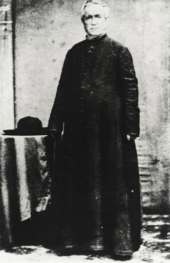 Ch. Laval (1808-1880) Avec le père Caret et le frère Murphy, il arrive aux Gambier en 1834. Quatre ans plus tard la conversion était achevée et commença alors un formidable programme de construction accompagné de l’institution d’un Code mangarévien très sévère. On utilisa souvent , à tort,le terme de « théocratie » pour le système que Laval avait mis en place à Mangareva.